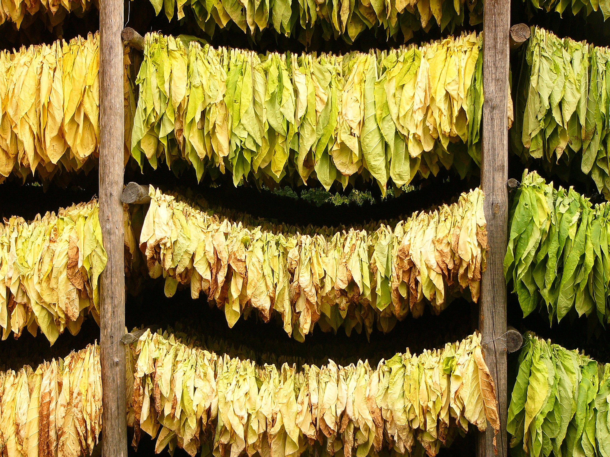 Tabakblätter beim Trocknen. Fotografiert in Vierbrücken/Sypitki in Ostpreussen.